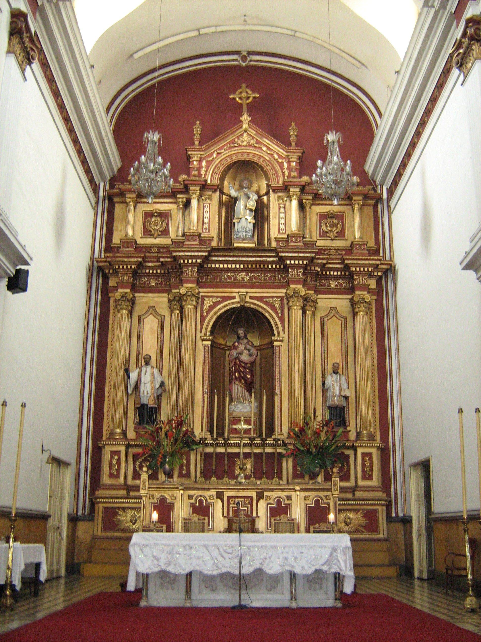 Iglesia de San Ignacio, Medellín. Colombia